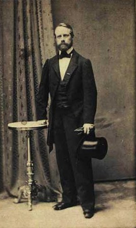 Jacob Frederik Marius Ernst (1820-1897), Danish general